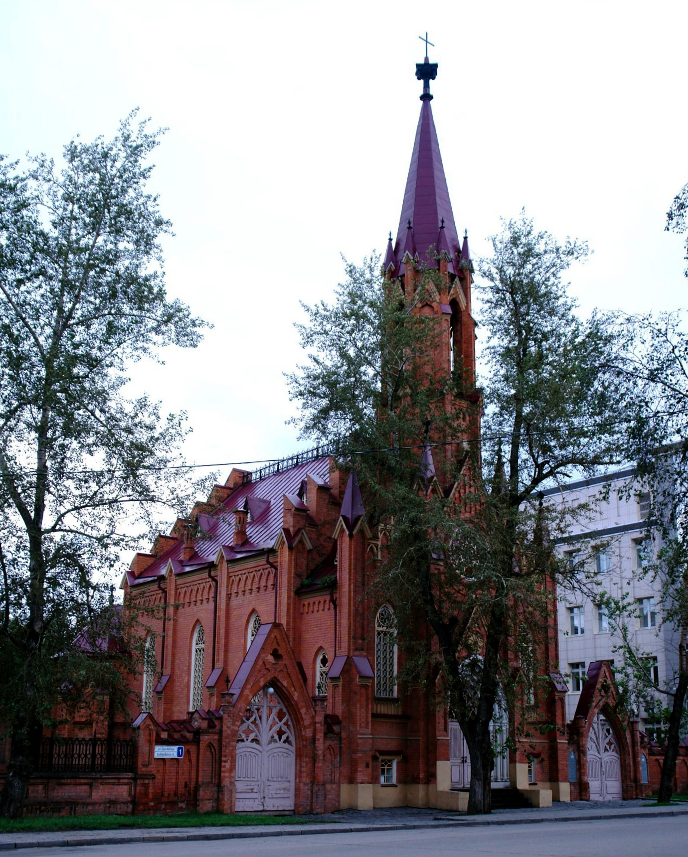 Костёл в Иркутске